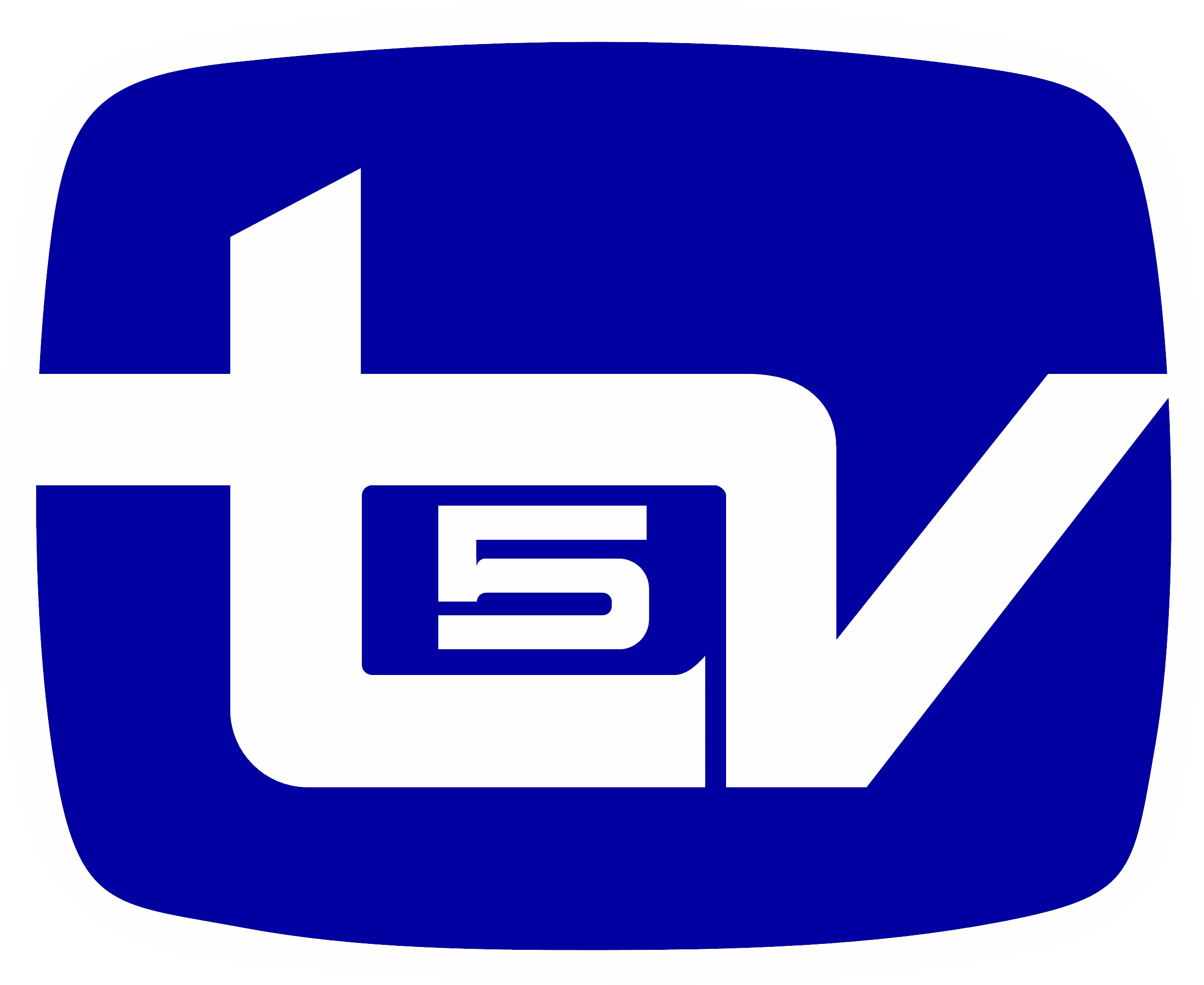 Símbolo de Canal 5 desde 1978